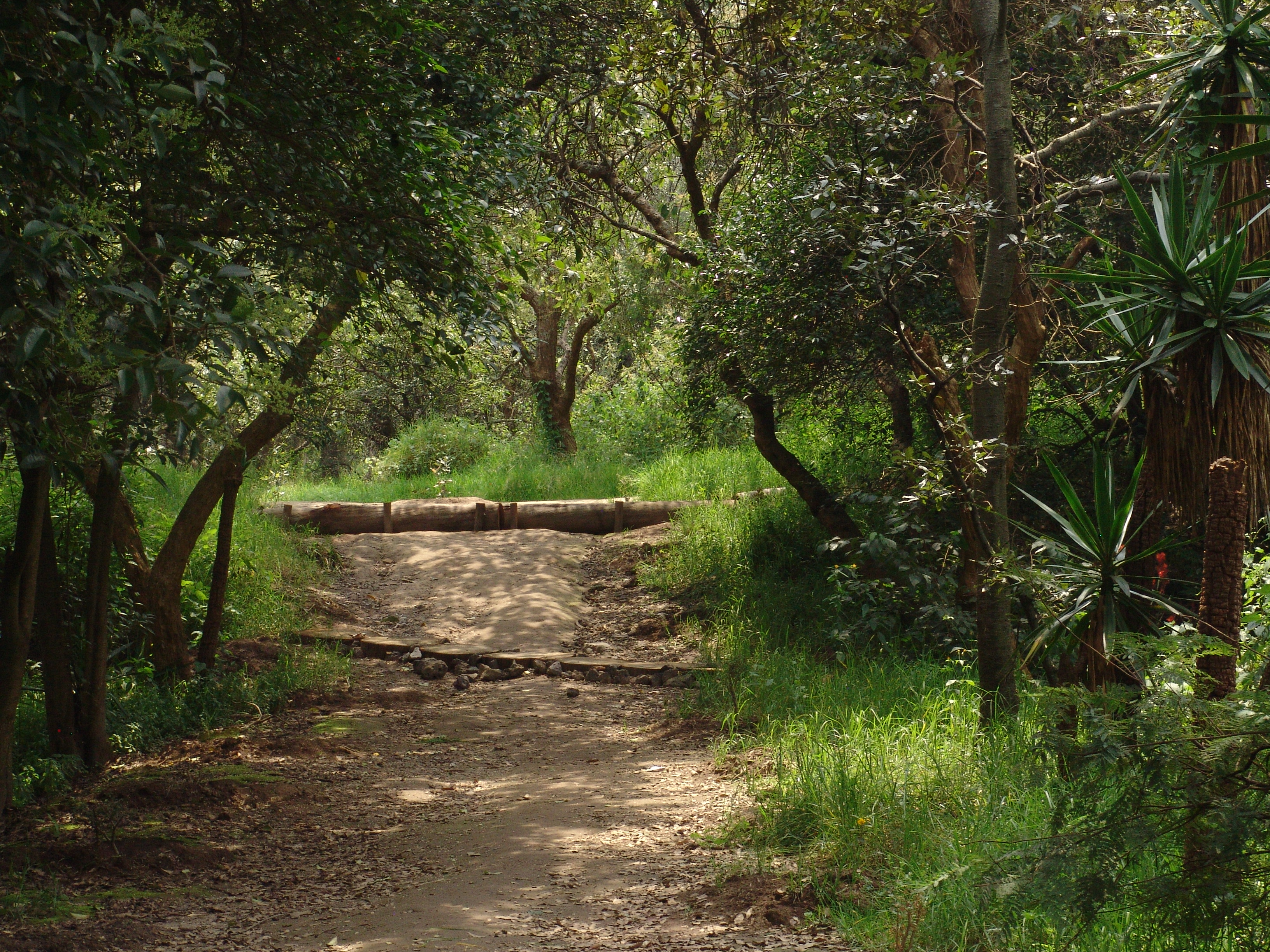 Foto de uno de los senderos que conforman los paisajes del Bosque de Tlalpan (Delegación Tlalpan, Distrito Federal, México).